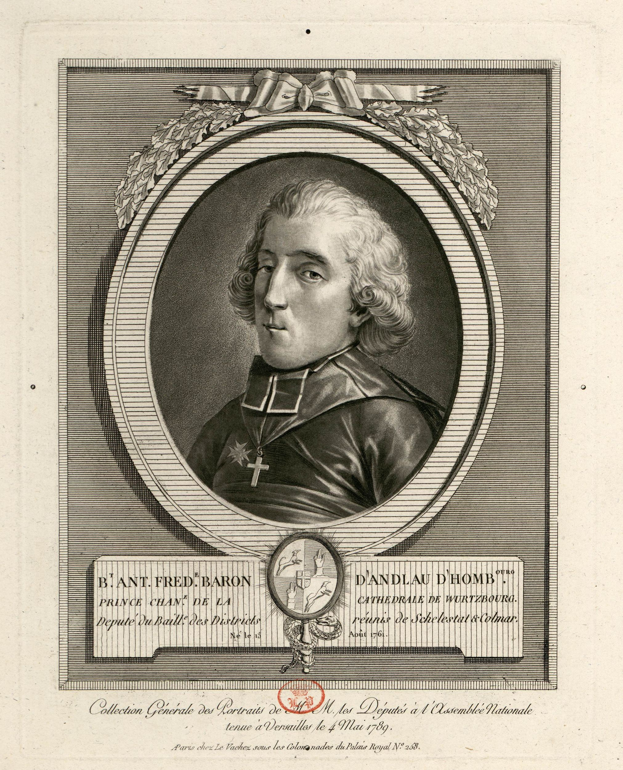 Benoît-Antoine-Frédéric d'Andlau de Hombourg (1761-1839), député du clergé aux États généraux de 1789 pour le bailliage de Colmar et Schelestadt, et député à l'assemblée constituante